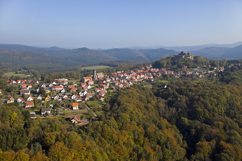 Château de Lichtenberg